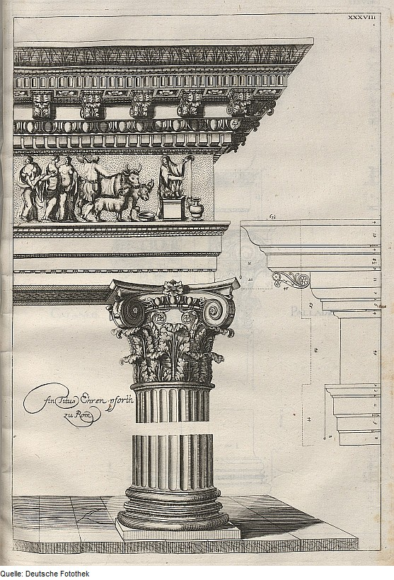 Original image description from the Deutsche Fotothek Architektur & Säule & komposite Ordnung & Triumphbogen